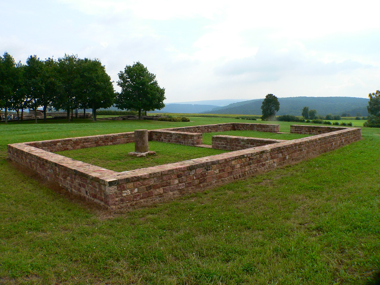 Römische Villa Haselburg im Odenwald, Hessen, Heiligtum mit Fundstück der Jupitersäule